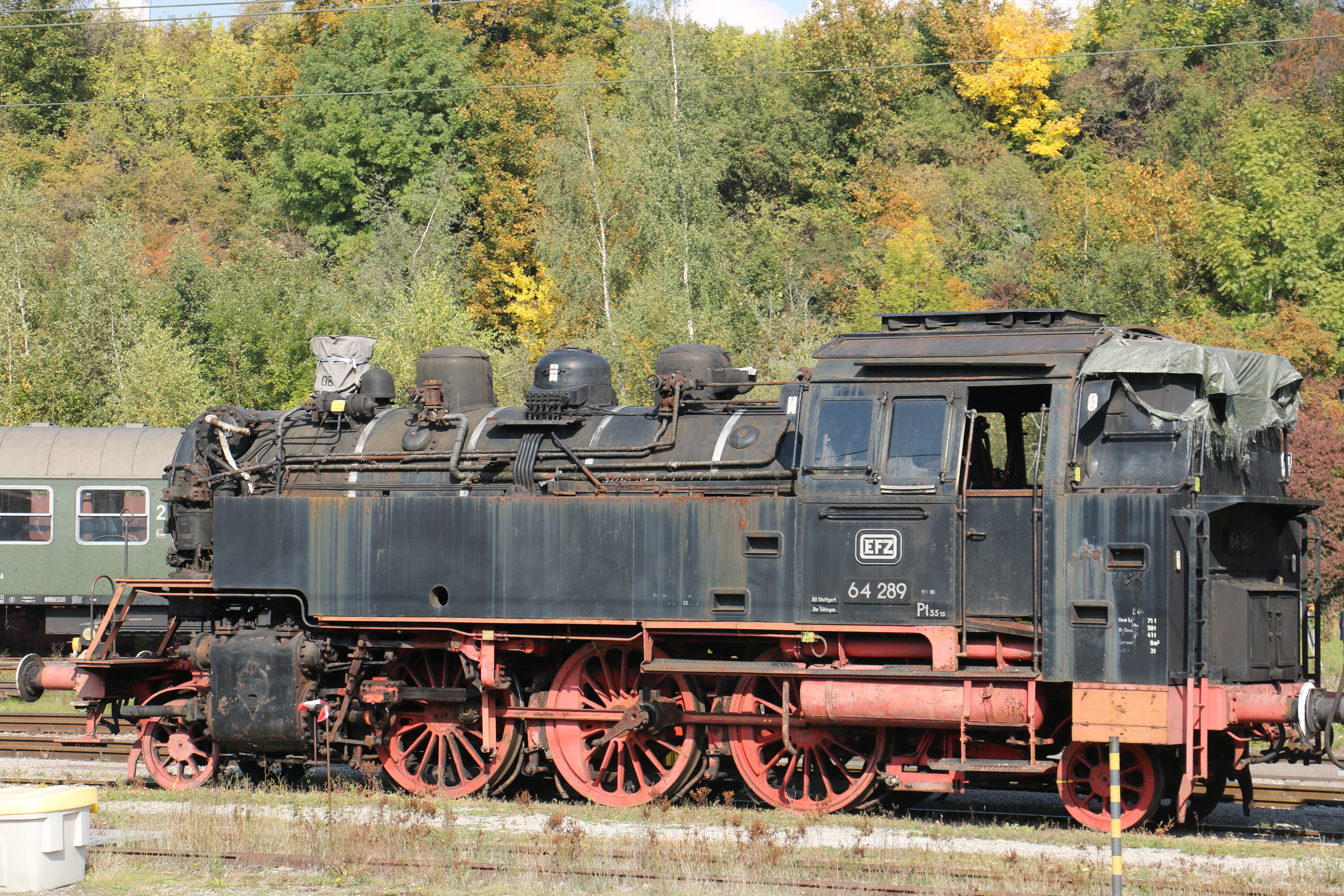 Dampflokomotive der EFZ